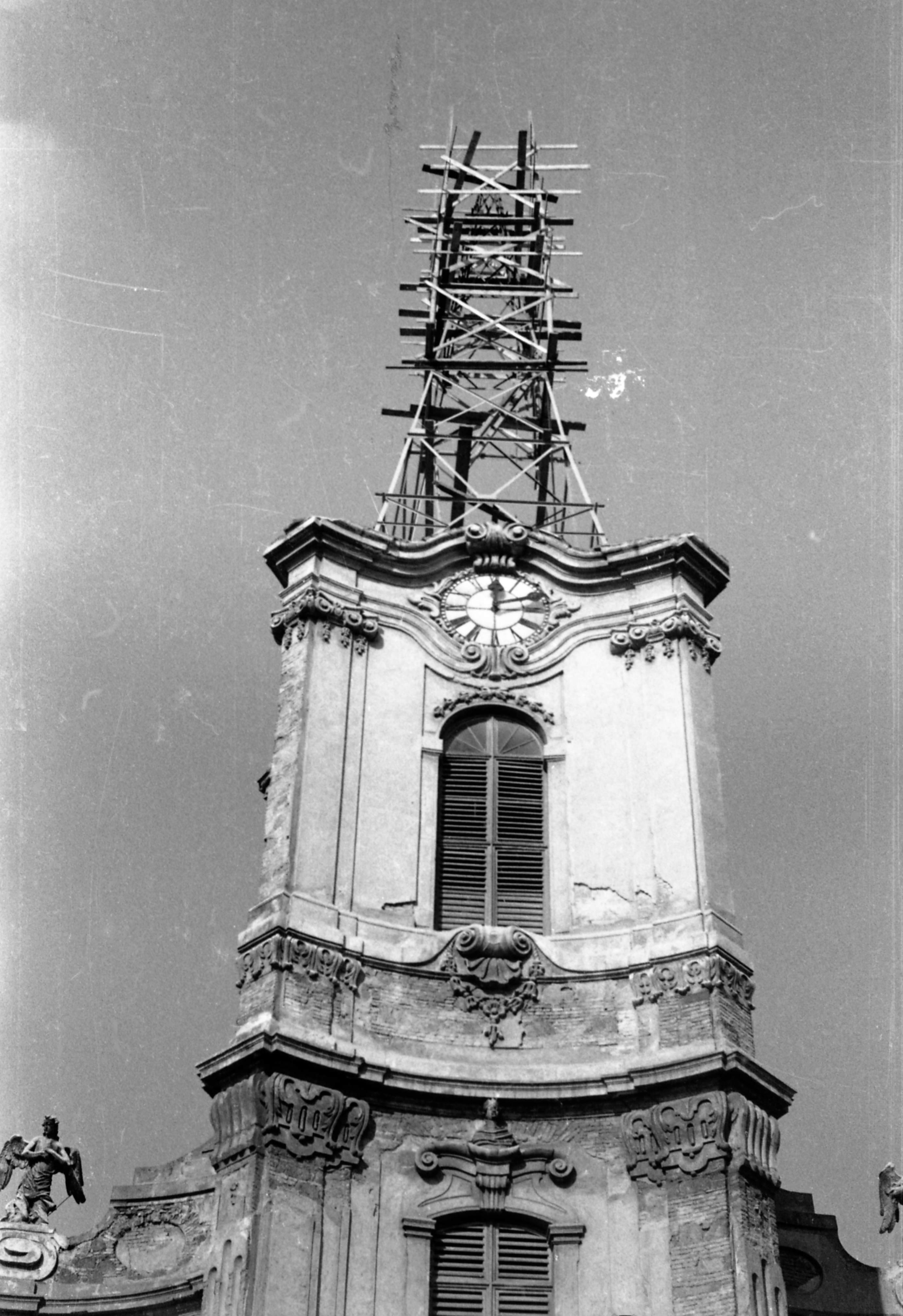 a Nagyboldogasszony templom tornya az 1956-os sérülések helyreállítása idején. Location: Hungary, Jászberény Title: a Nagyboldogasszony templom tornya az 1956-os sérülések helyreállítása idején.